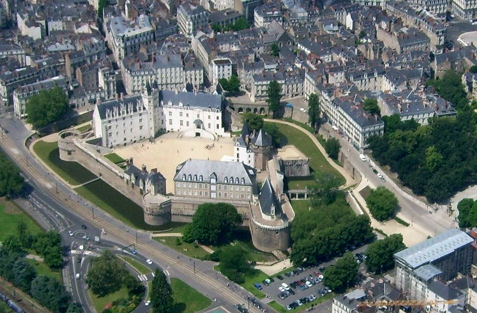 Vue aérienne du château des ducs de Bretagne (Nantes, France)